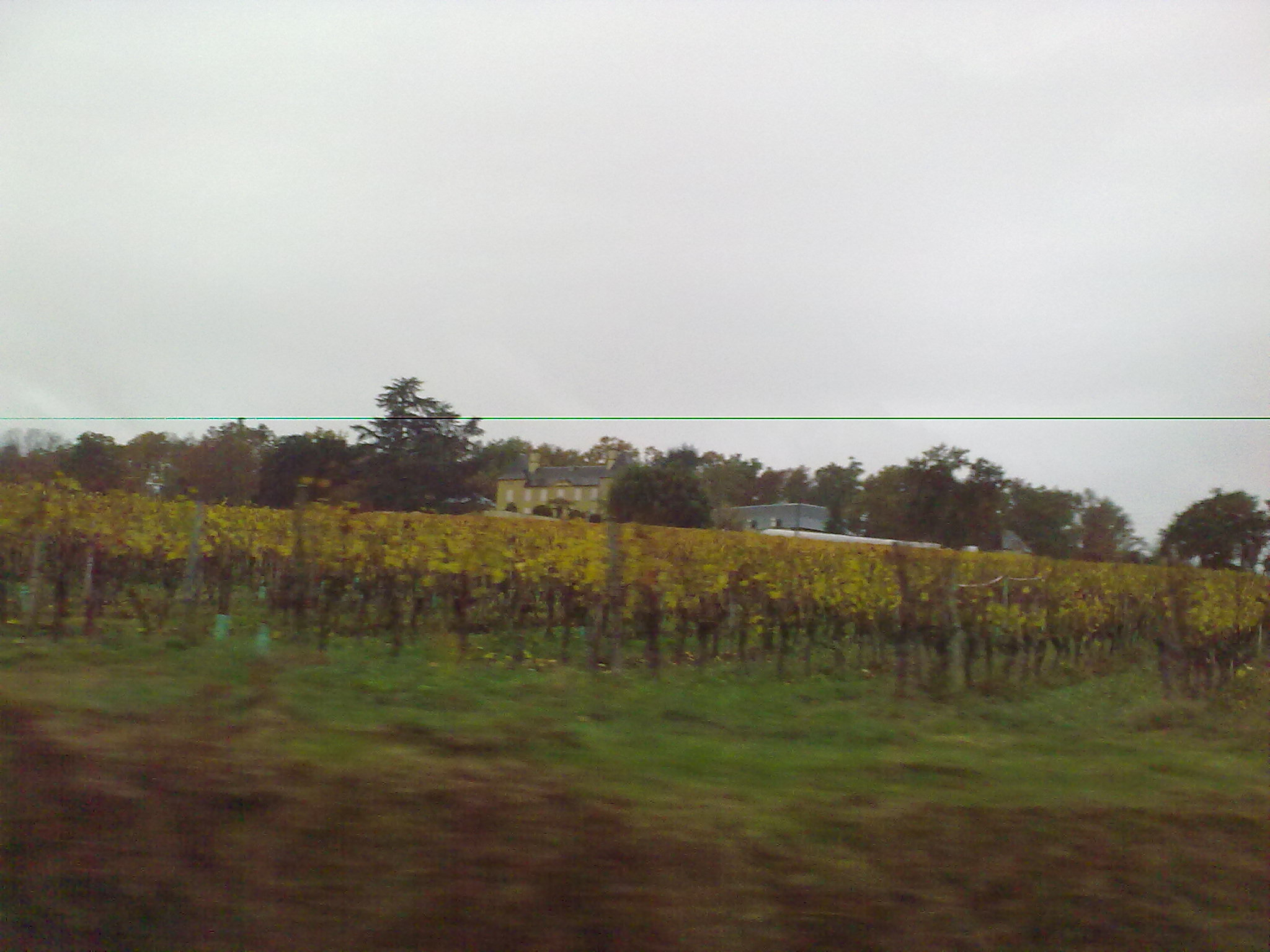 Diusse